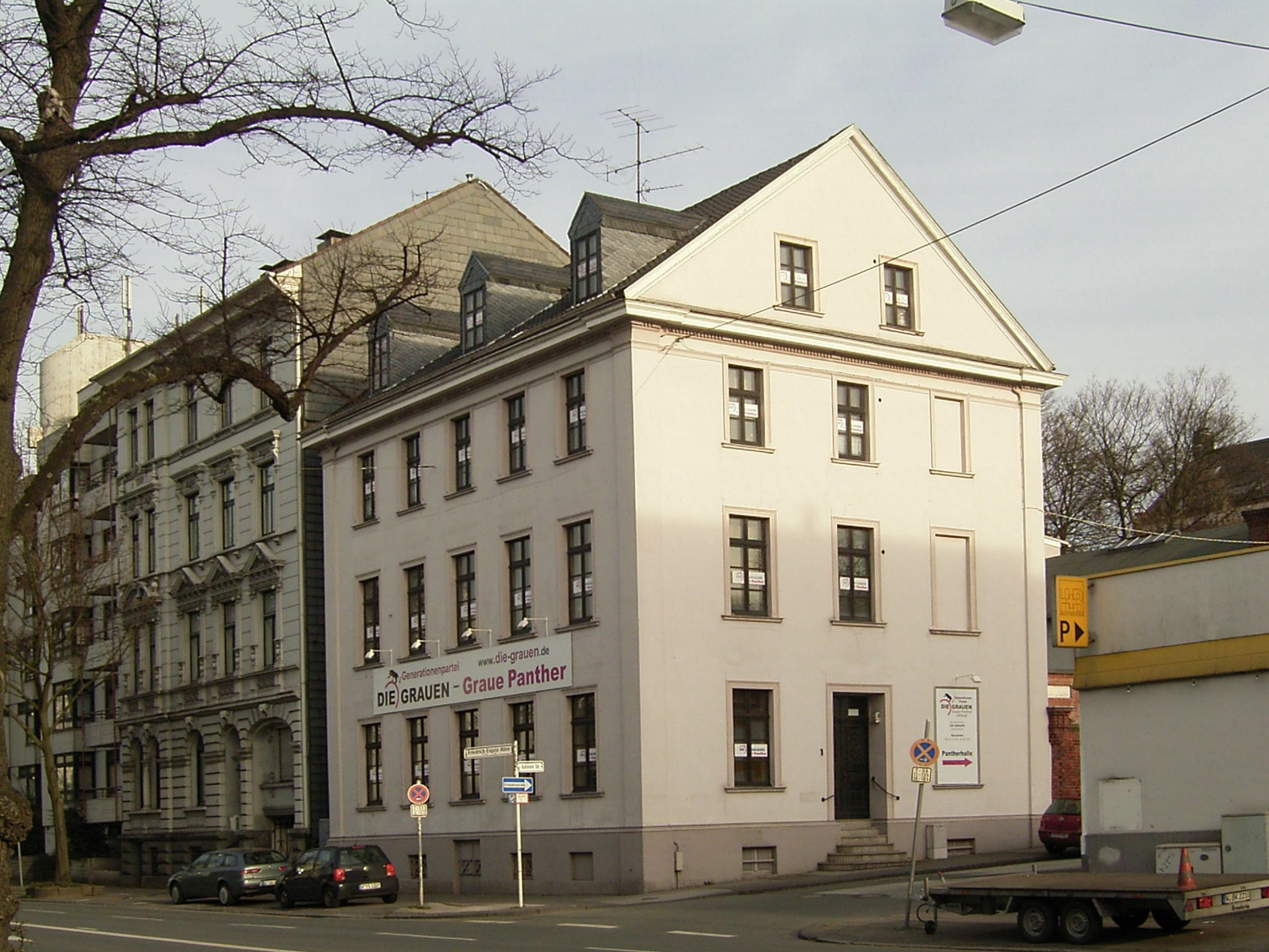 Die Grauen in Wuppertal